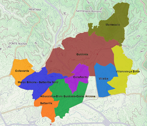 Suddivisioni amministrative del comune di Guidonia Montecelio. La precisione della mappa è approssimativa, e non sono presenti tutte le strade e gli edifici (vedere progetto openstreetmap)